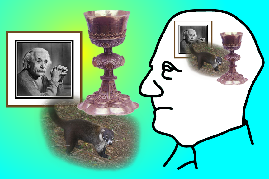 Cartesian-materialism